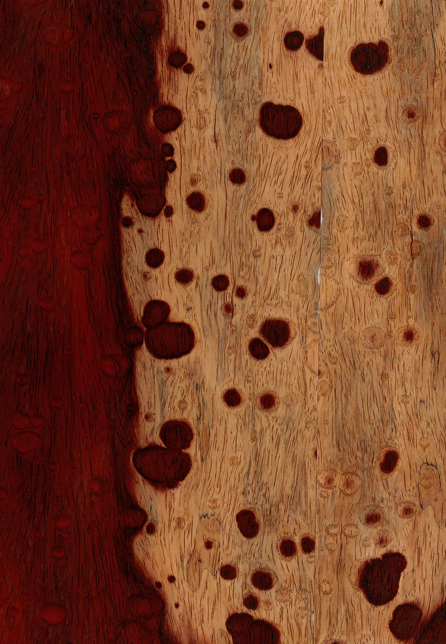 Furnierblatt eines besonderen Edelholzstammes (Padouk, Burmese Rosewood, Pterocarpus indicus) – Paduk mit Splintholz, das gemuschelte oder auch Pommelemaser ist hier eine Besonderheit, rechts im Bild ist eine Furnierfuge (Klebestelle)